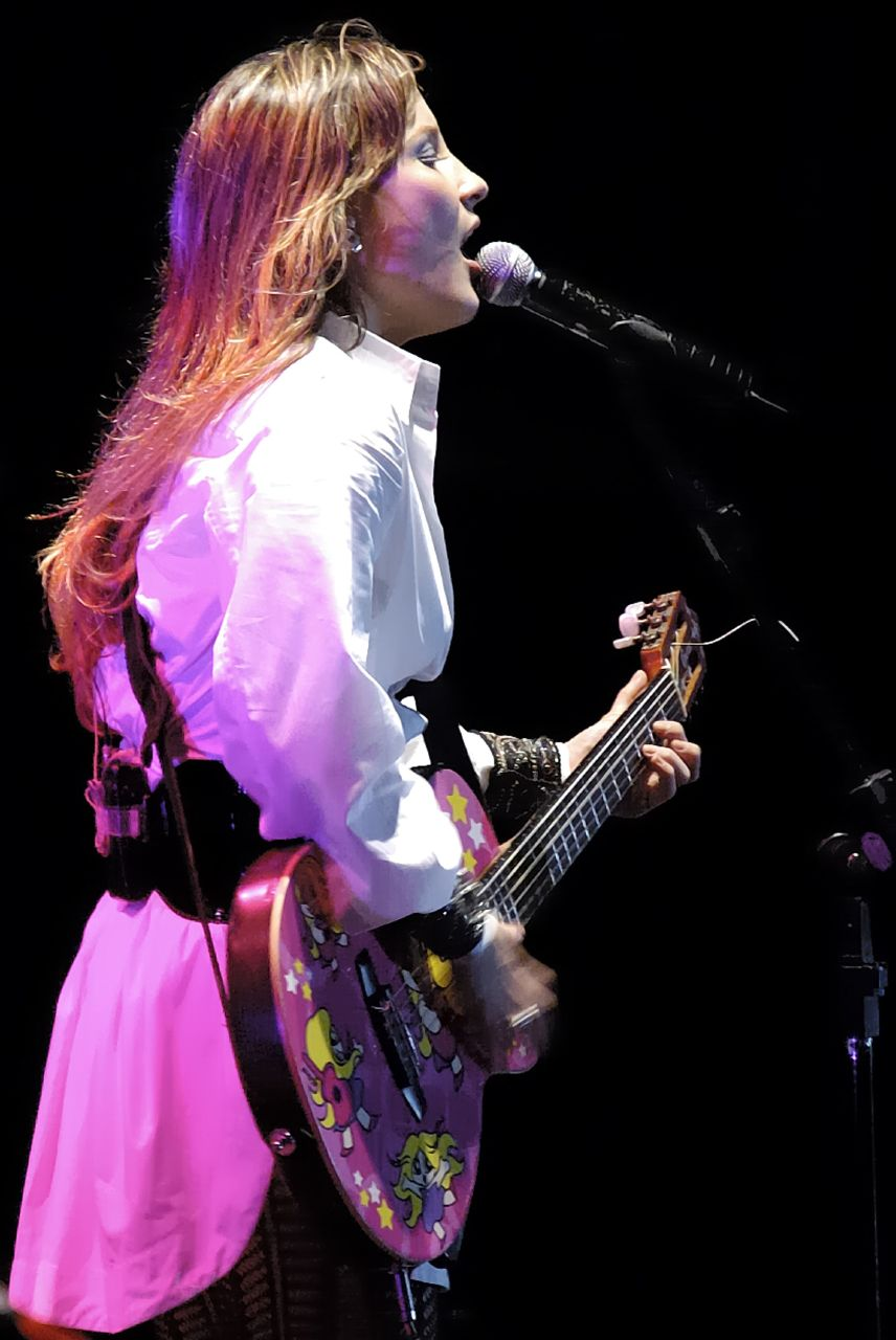 Realmente fotógrafo de show tem que ganhar bem, o que não é o meu caso...rsrs Foi sofrido ontem fotografar o show dela, primeiro esperar 2 horas até liberarem o acesso da imprensa ao camarim, depois todos fotógrafos serem barrados de fotografar de frente do palco, depois correr pra tentar falar com a produção da banda o pq não poder fotografar de frente ao palco, depois mais uma meia hora pra entrar de dois em dois fotógrafos em cima do palco, ficar no máximo por cinco minutos e já sair, além do mais aguentar segurança chato enchendo o saco pedindo pra vc sair do palco....hahaha...brincadeira né!? foi uma frescura que nunca ví igual...todo mundo ficou muito puto...a (des)organização dessa festa está horrível, nunca pensei que fosse assim... Hoje no outro show não foi diferente....liguei o foda-se e não vou mais nessa m****...rs ps: Convivendo por uns dias nesse mundo de imprensa pude até presenciar uma disputa de par ou impar na fila da imprensa pro camarim, pra saber quem de qual rádio ia entrar no camarim....hahaha...fala sério... Depois é ficar sabendo que um nerd com uma maquina na mão fotografando o bombeiro dar uma surra num cara bebado e depois os bombeiros querendo tomar a maquina do cara, enquanto isso um outro filmando, enfim, todo mundo pra delegacia....é, valeu o aprendizado pelo menos do que pode fazer e do que não pode fazer quando presenciar uma cena dessa...rsrs E também dos caras do Roupa Nova terem dito que nunca mais pisariam nessa m**** de cidade....hahaha ..esse são alguns dos "babados novos".....hahaha